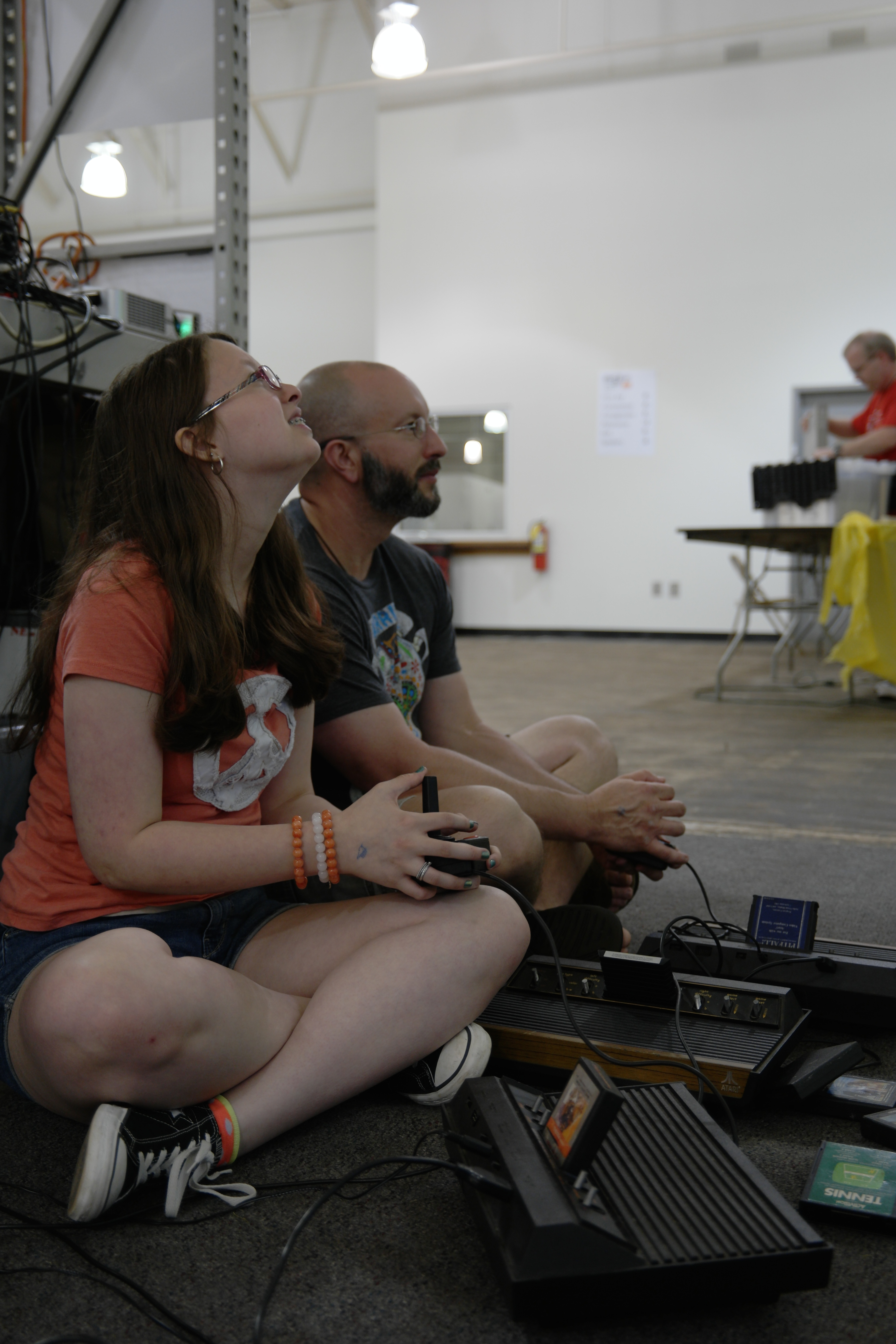 Playing Atari 2600 games